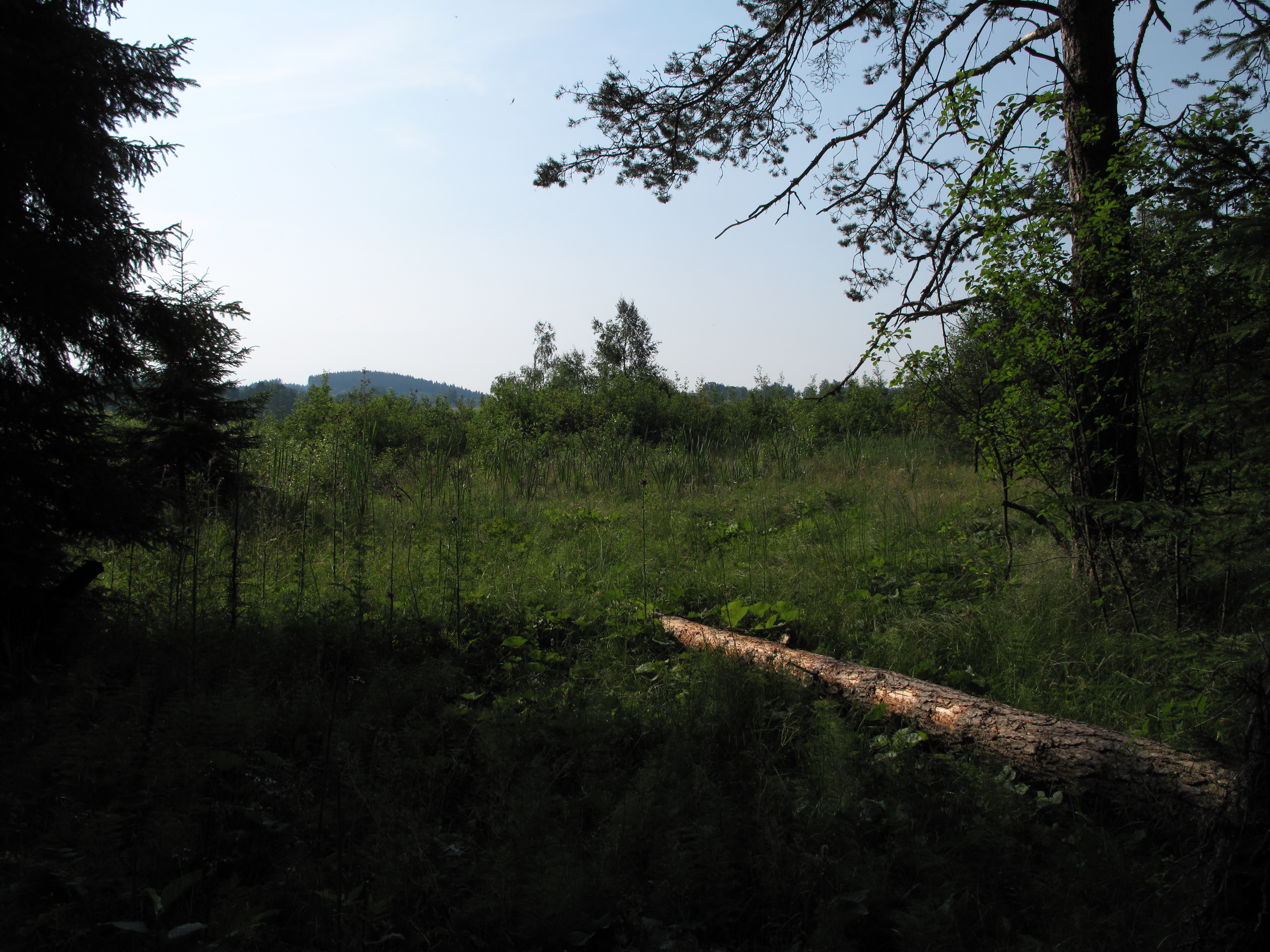 Přírodní rezervace Na Mokřinách. Okres Český Krumlov, Česká republika.